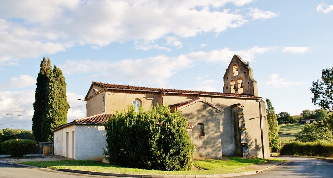 L'église